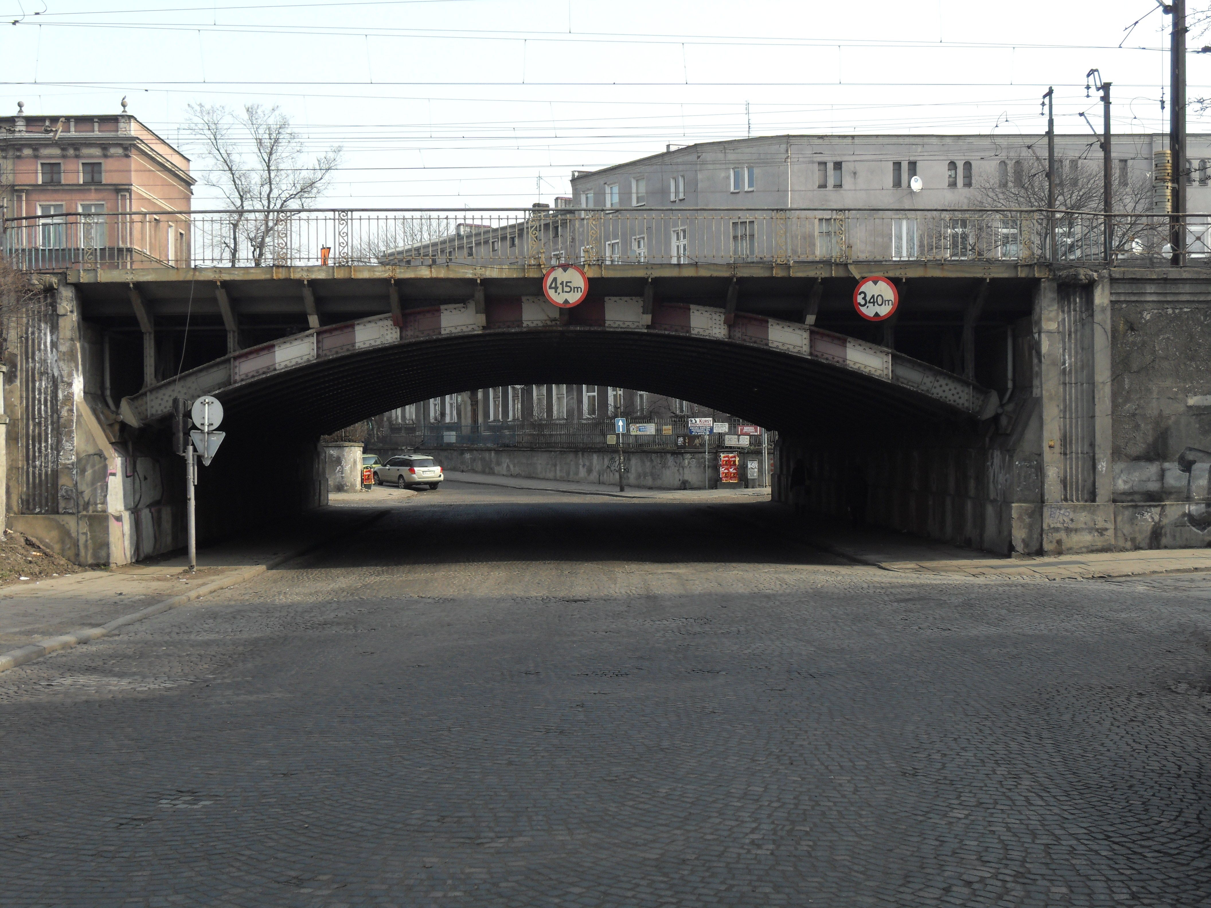 Gdańsk Wrzeszcz. Wiadukt, ul. Zator-Przytockiego.